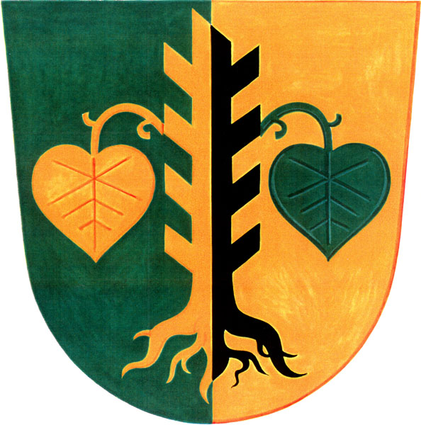 Znak obce Mladoňovice (okres Chrudim)